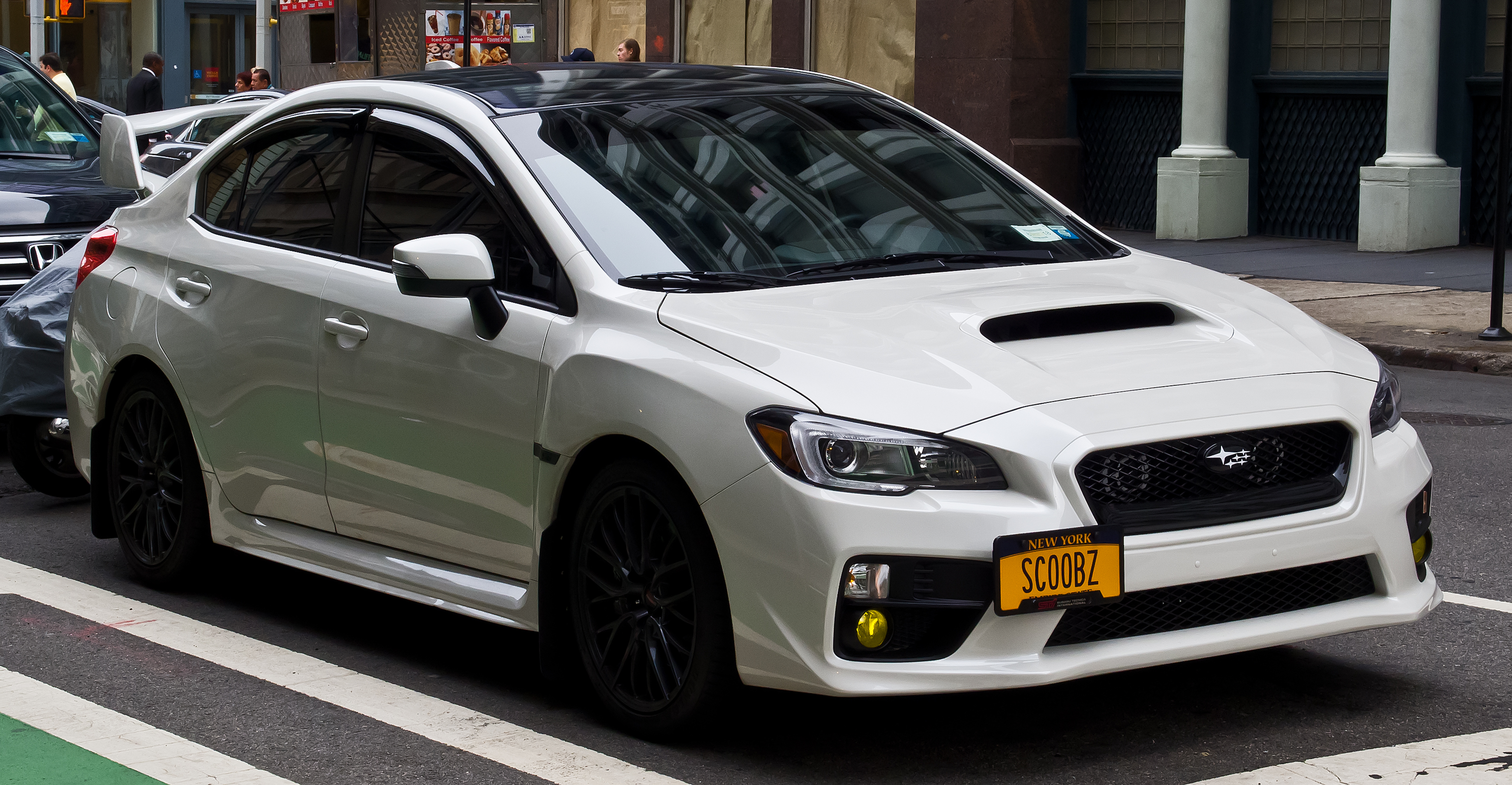 Subaru WRX STI (IV)